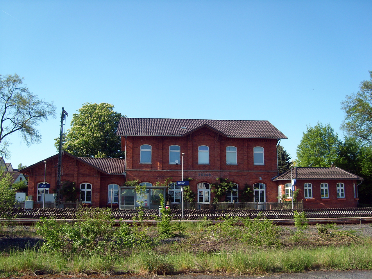 "Kulturbahnhof Uslar" aus südlicher Richtung gesehen. Mai 2008.